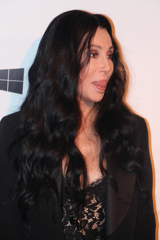 21 - Cher-002